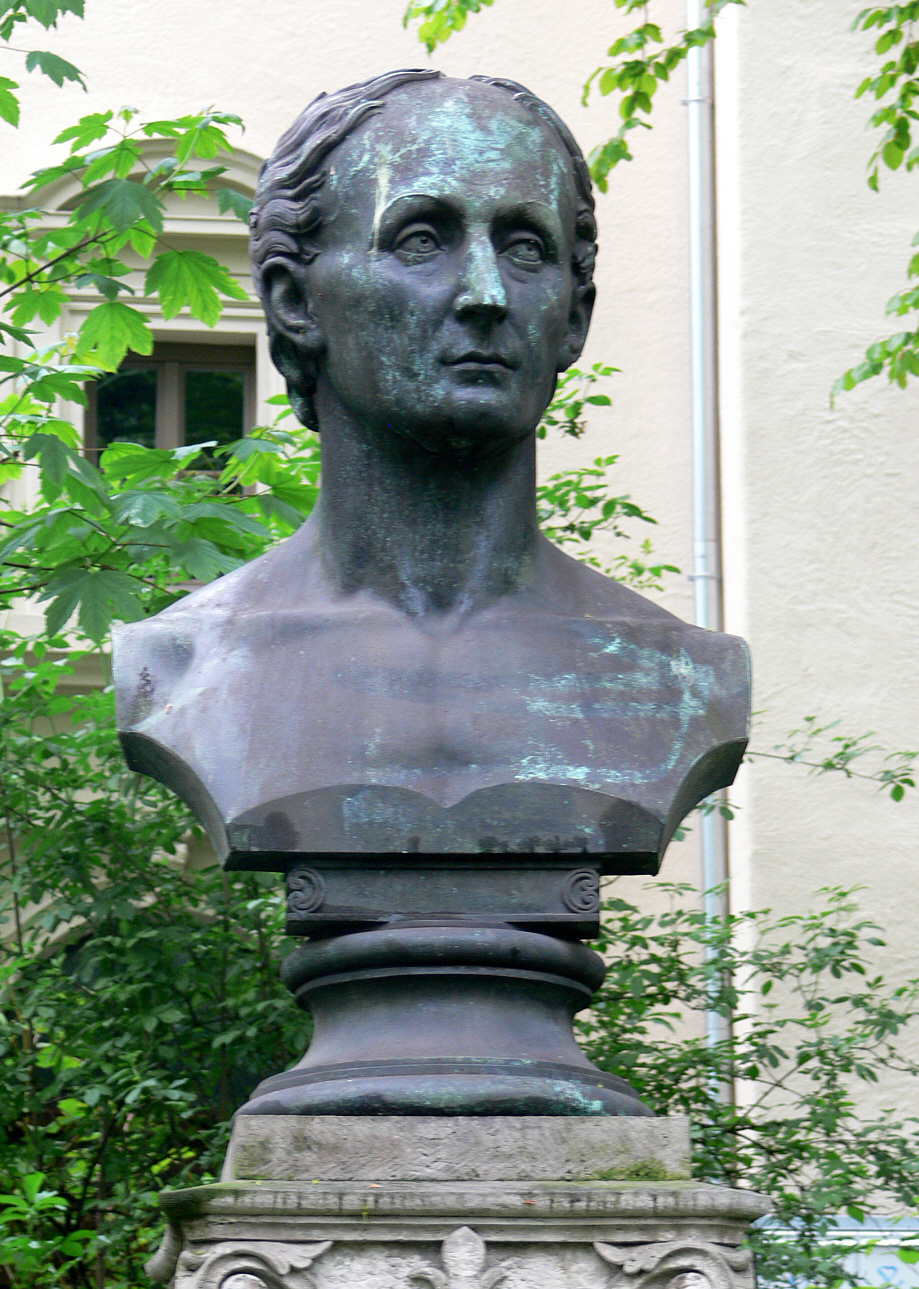 Jena: Denkmal für Jakob Friedrich Fries am Fürstengraben